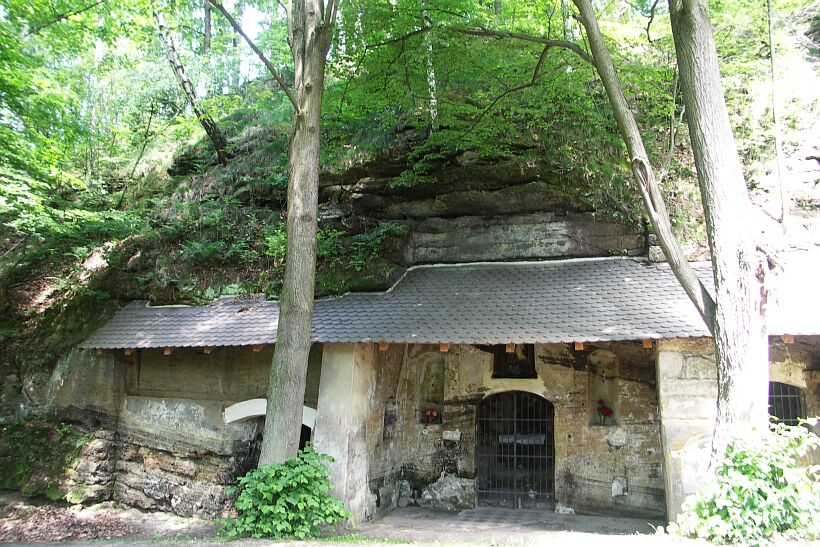 Boží hrob (Gottesgrab) near Velenice (Wellnitz), Česká Lípa District, Czech Republic